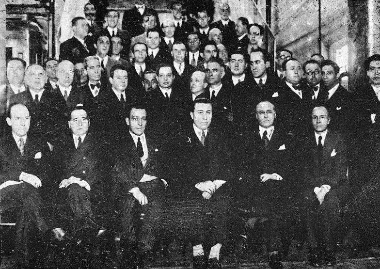 Banquete en Lar Gallego ao seu vicepresidente Severino Barros de Lis con motivo da súa elección como deputado, 1934.Fotografía en Vida Gallega 1934